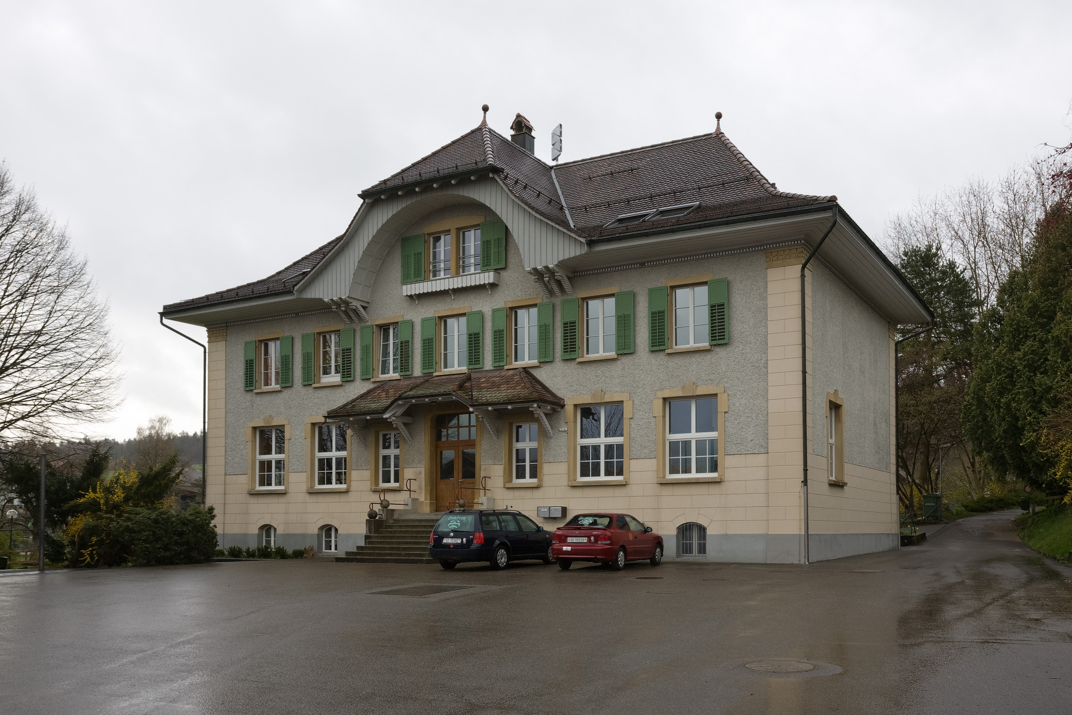 Schulhaus von Lüsslingen, Kanton Solothurn, Schweiz